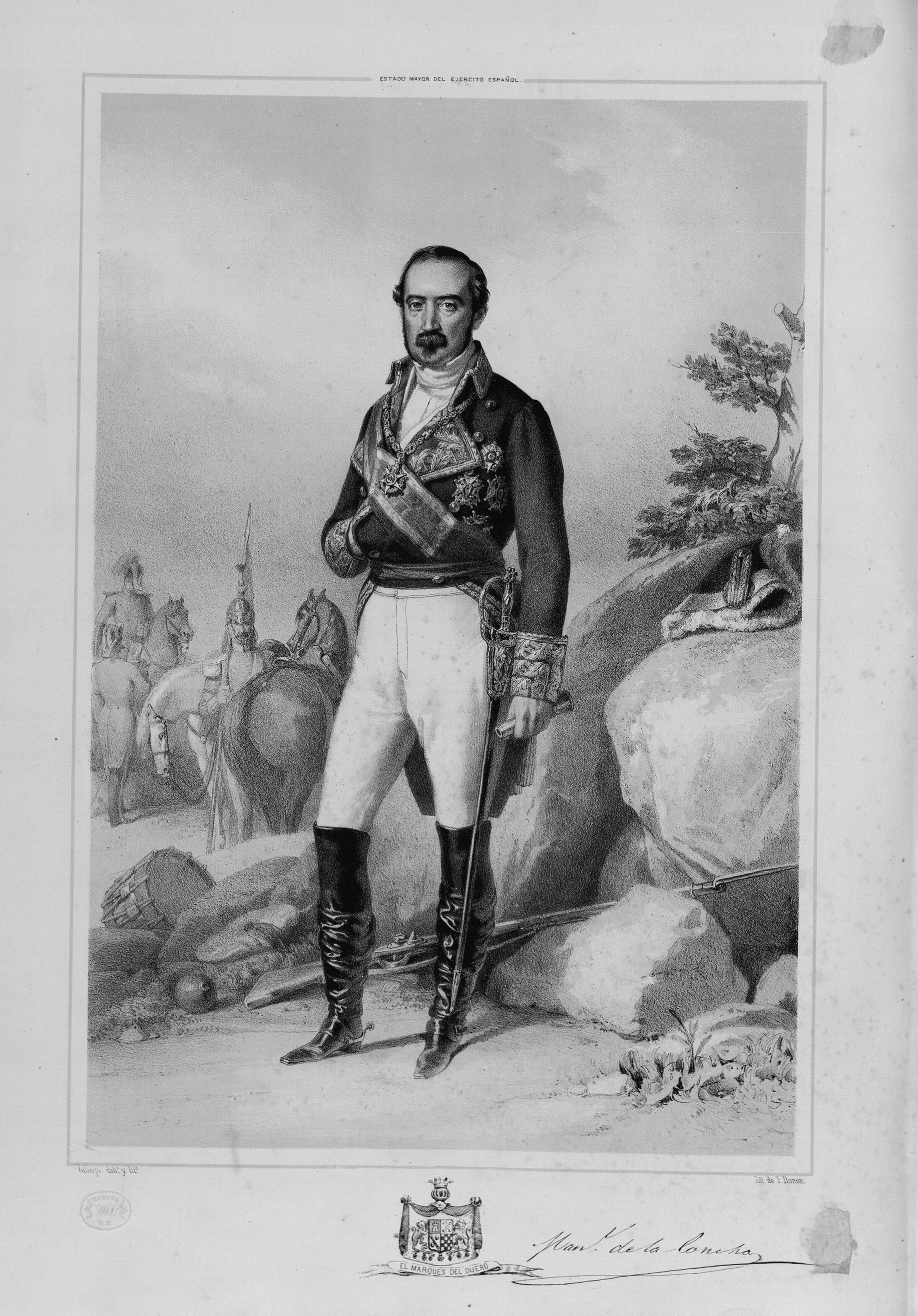 Manuel de la Concha, marqués del Duero.